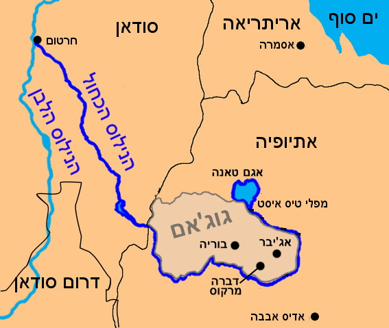 הנילוס הכחול